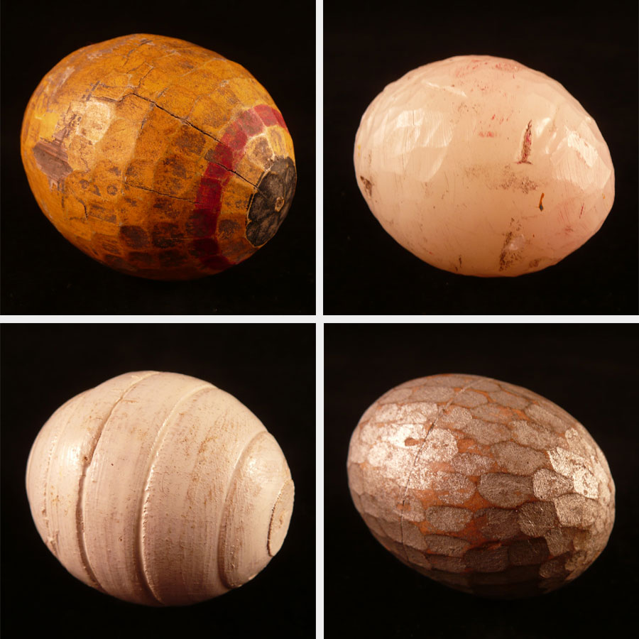 Choulettes, de eivormige (meestal: beukenhouten) ballen waarmee choule (ook: chole of jeu de crosse) wordt gespeeld.